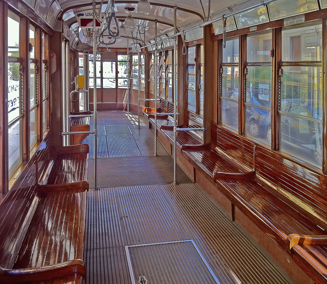 Interno della vettura 1878